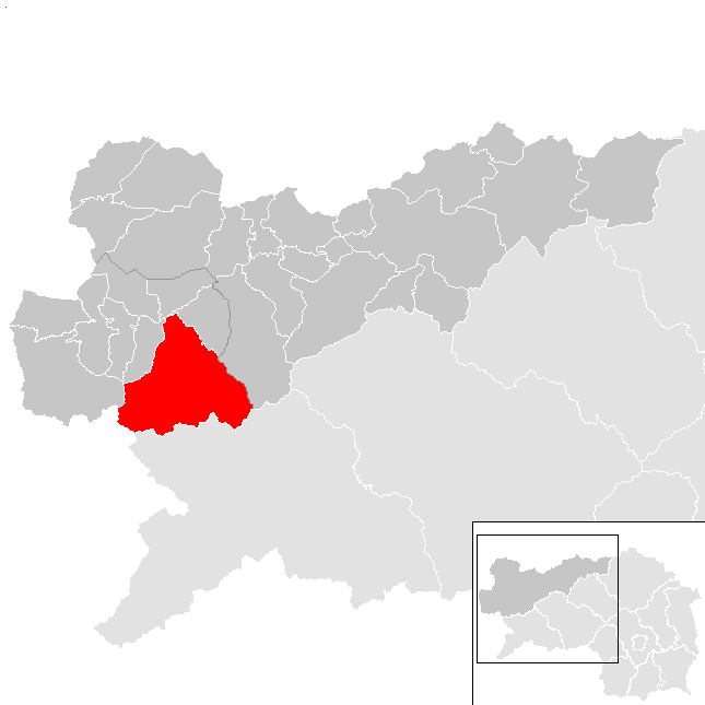 Lage von Sölk im Bezirk Liezen